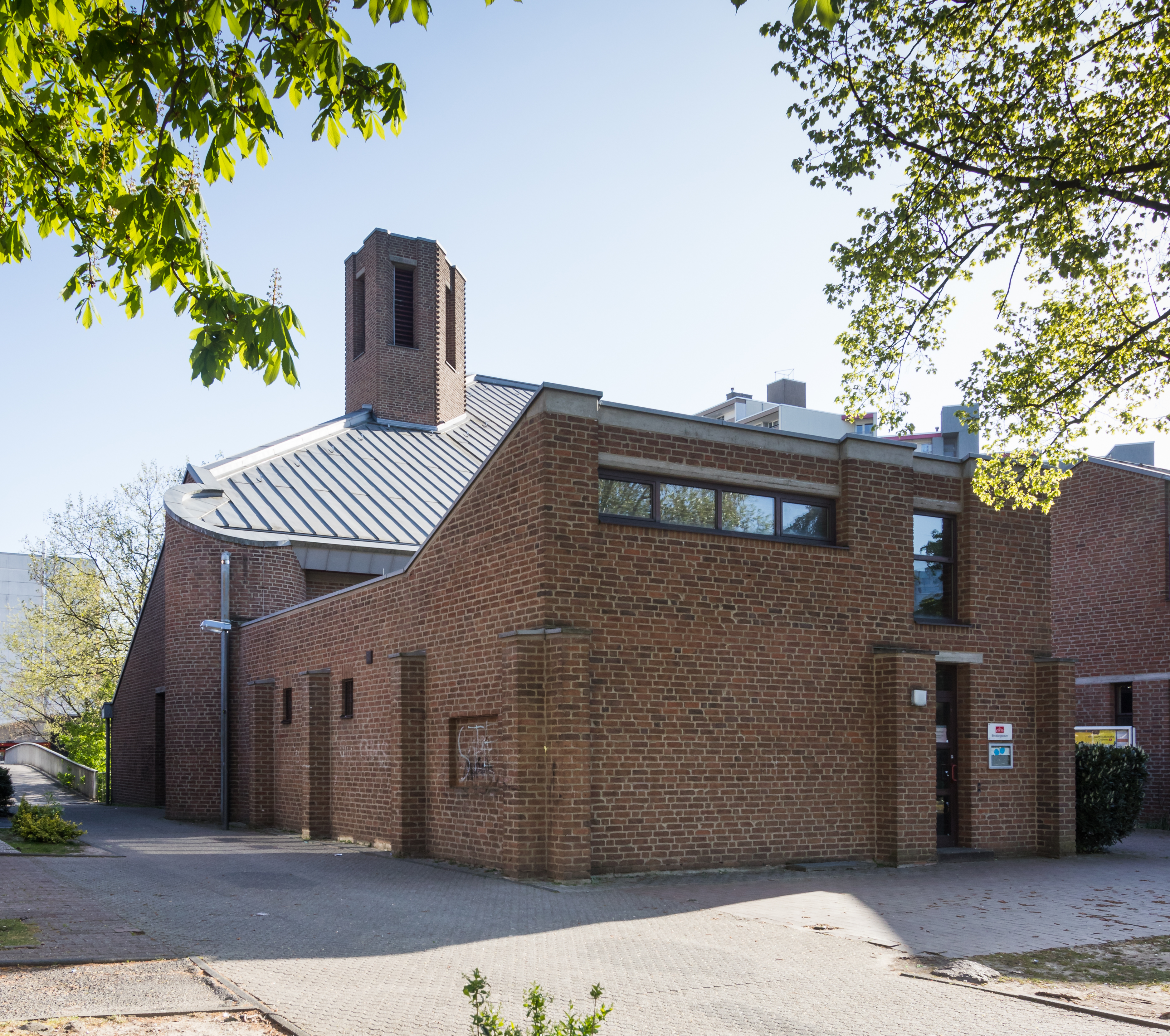 St. Maximilian Kolbe, Köln-Porz-Finkenberg, Architekt: Hans Schilling